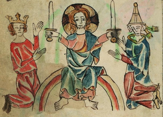 Oldenburger Sachsenspiegel. CIM I 410, Bl. 6v